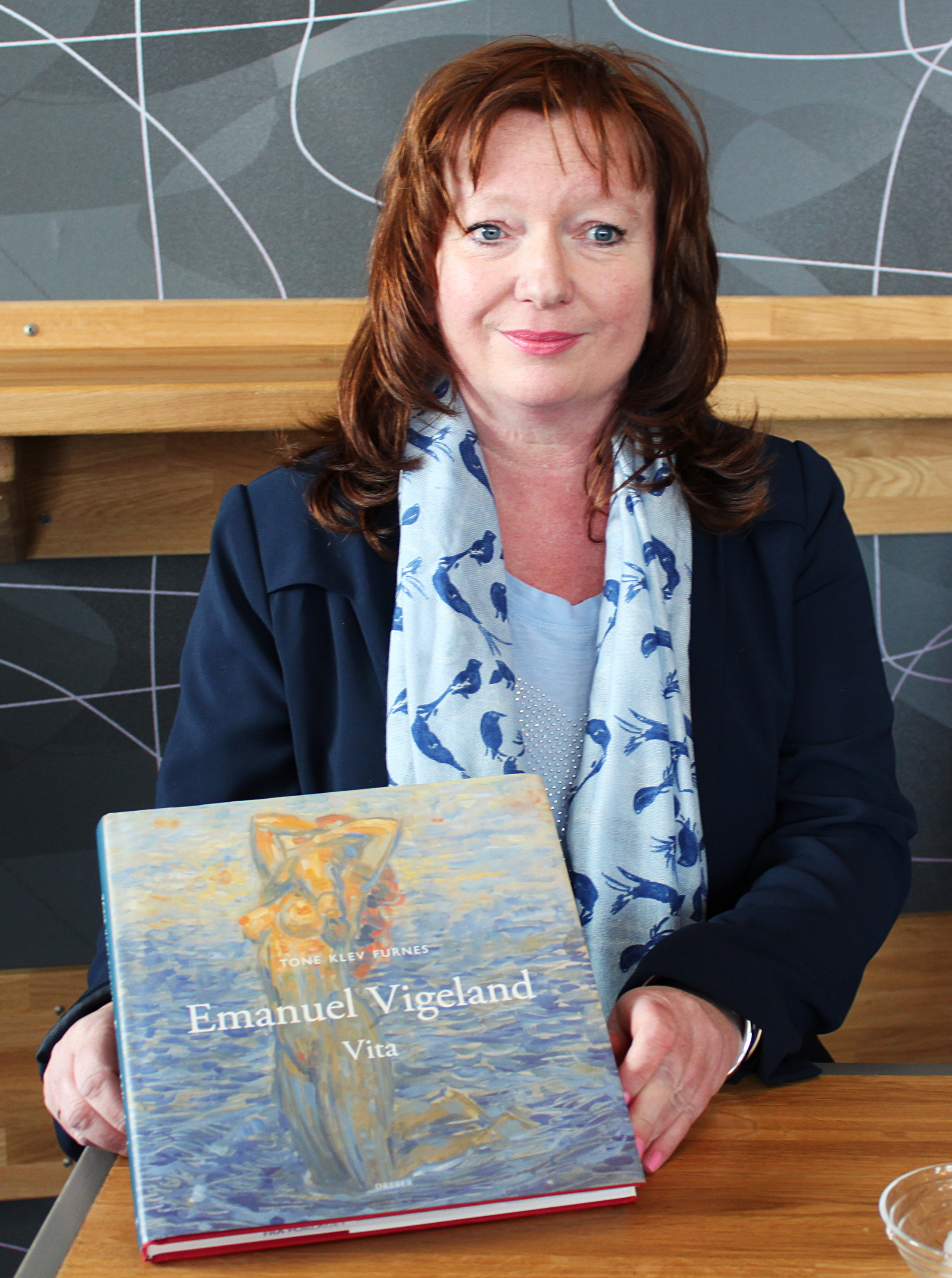 Forfatteren og kunsthistorikeren, cand. philol. fra Universitetet i Oslo (1999), Tone Klev Furnes var en av to vinnere av Sørlandets litteraturpris 2014.